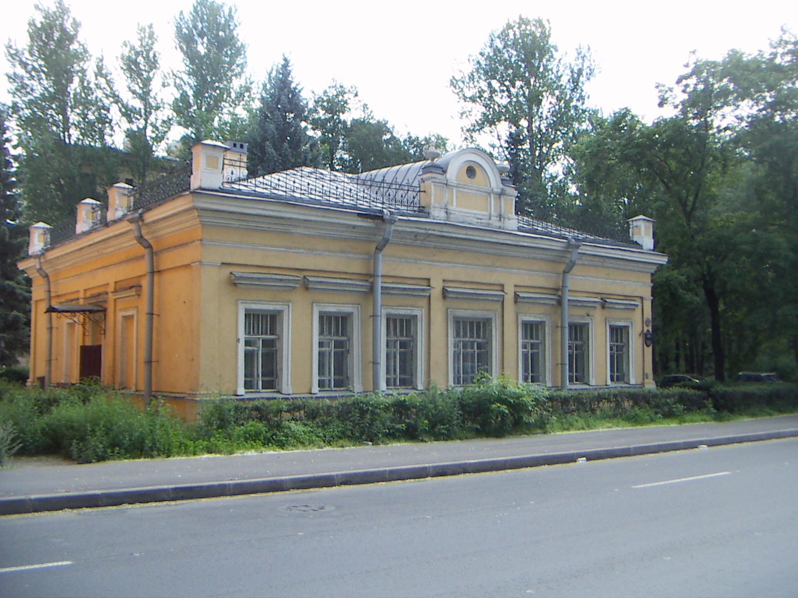 Museum 'Narvskaya zastava in Saint-Petersburg'